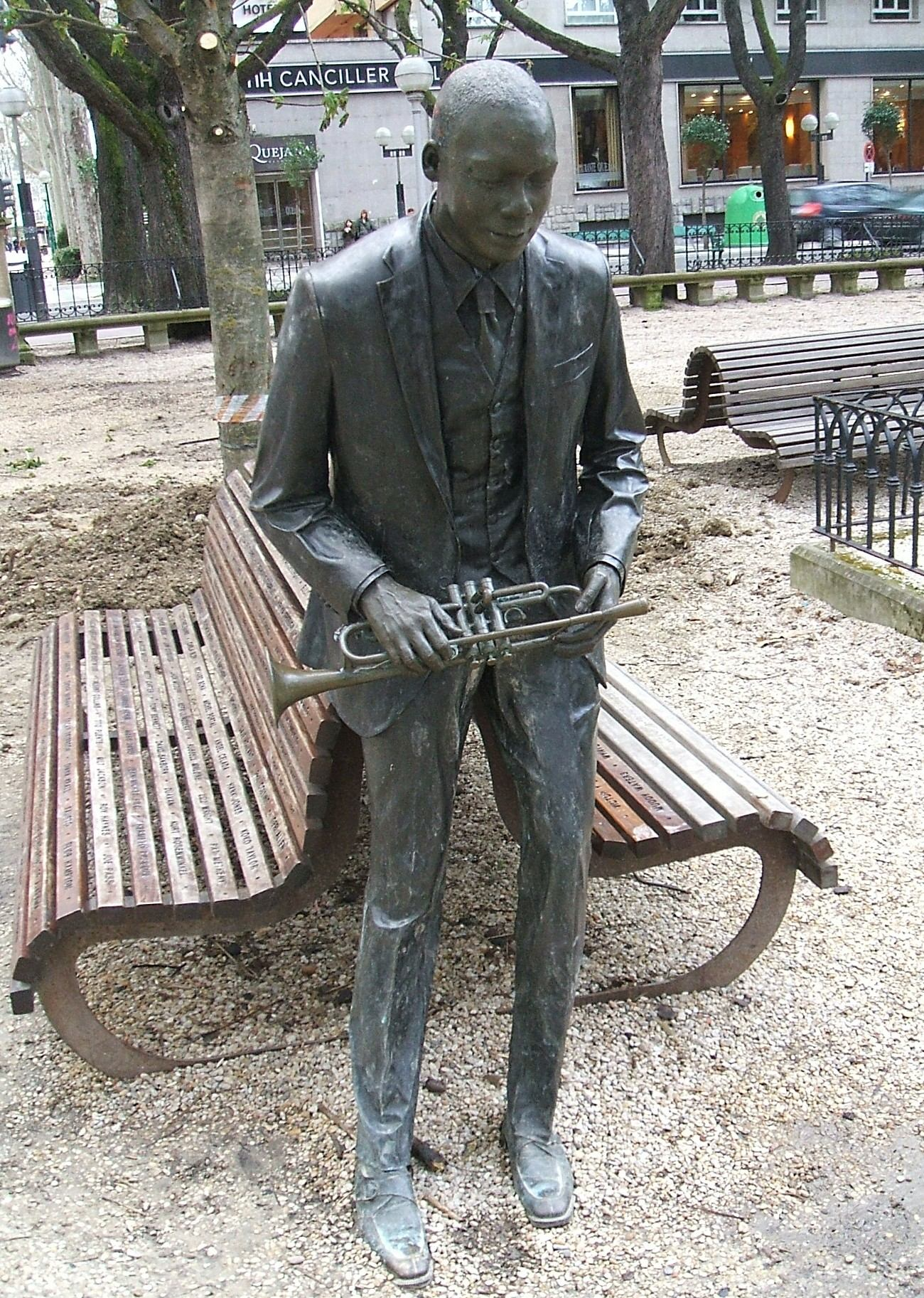 bronze statue dedicated to Wynton Marsalis at the Parque de la Florida, Vitoria-Gasteiz, Spain